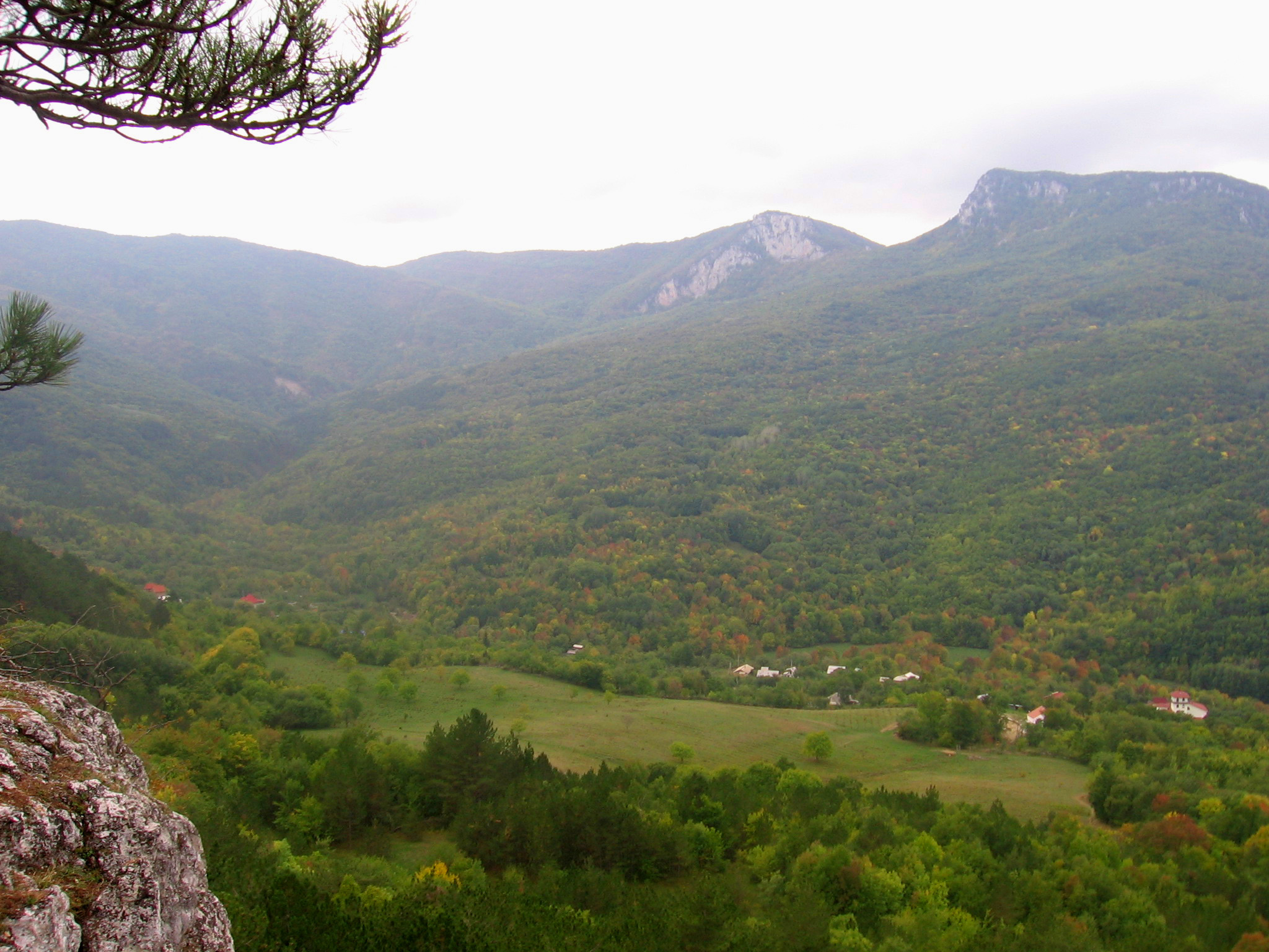 Верховья Бельбека, Крым